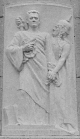 Joncherey. Premier monument au caporal Peugeot (détruit par les Allemands en 1940). Détail du bas-relief avec l'inscription : "Violation du droit".